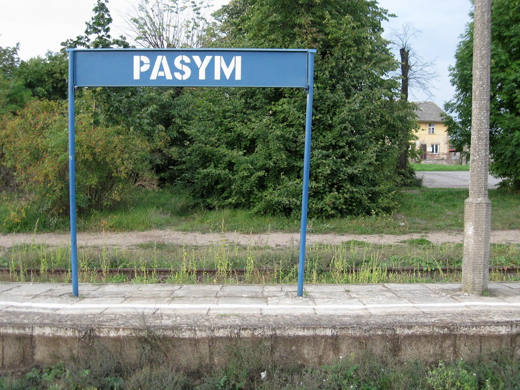 Tablica na stacji kolejowej w Pasymiu